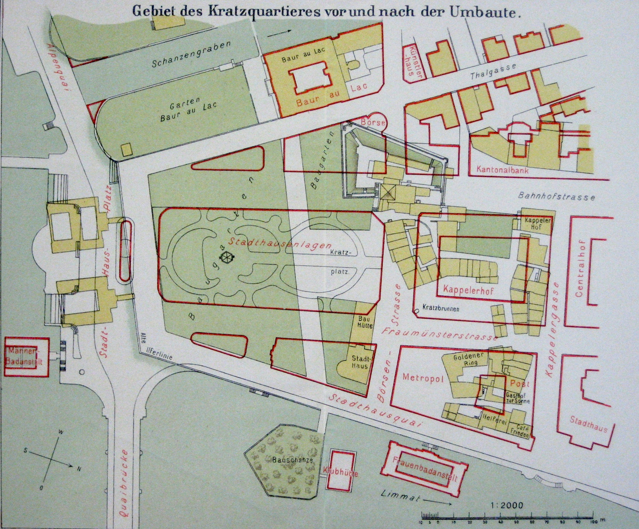 Plan von 1902 des Kratzquartiers in Zürich, vor und nach den Neubauten